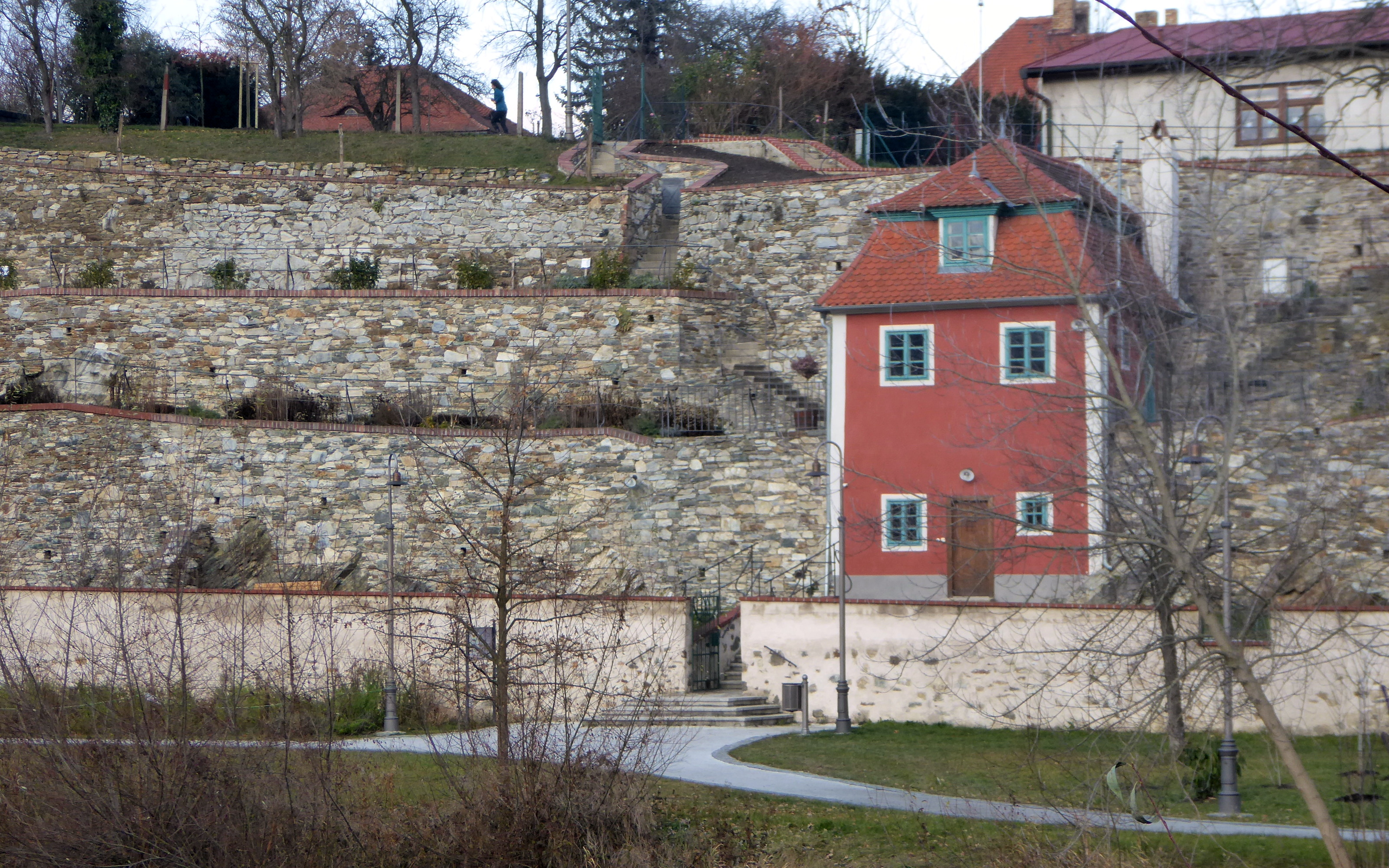 Český Krumlov, zahradní ateliér Egona Schieleho, od jihu.